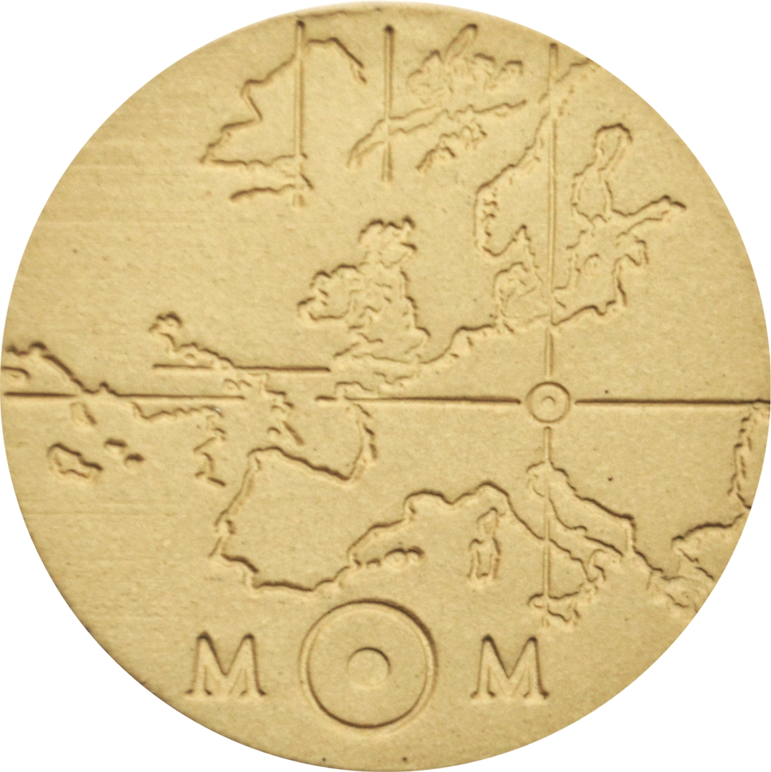 Die Vorderseite des Tokens des Memory of Mankind Projektes.